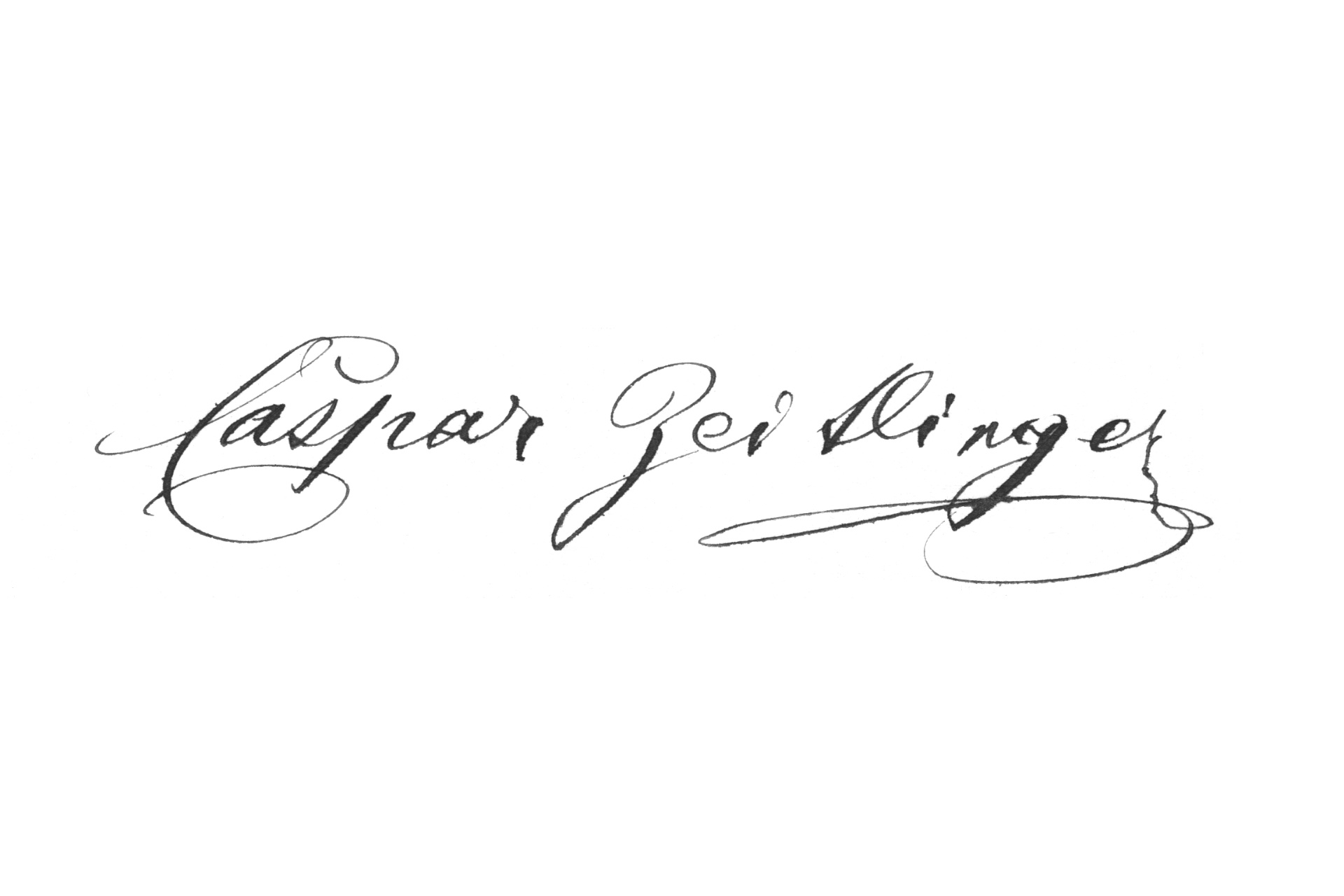 Unterschrift von Caspar Melchior Balthasar Zeitlinger auf einem Lehrzeugnis